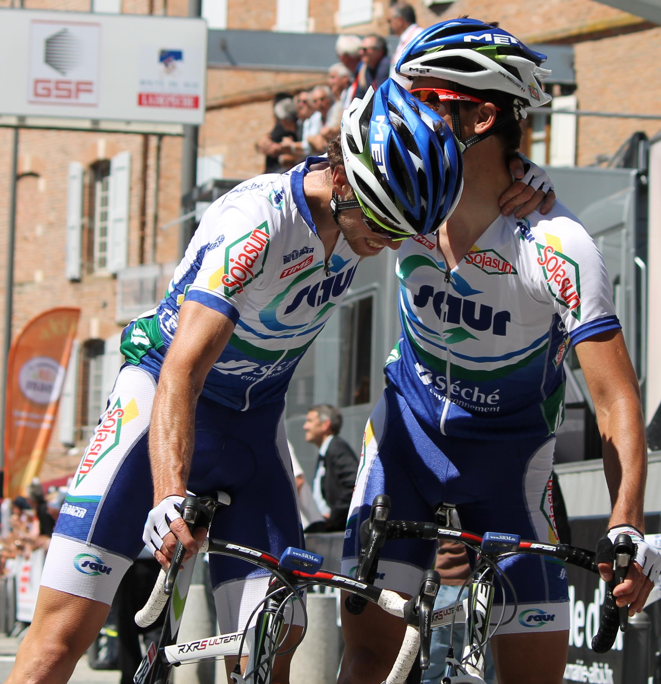 Après la victoire de leur coéquipier Stéphane Pouilhès, chez lui à Albi, Yannick Talabardon et Jimmy Engoulvent font une accolade au pied de la cathédrale Sainte-Cécile.